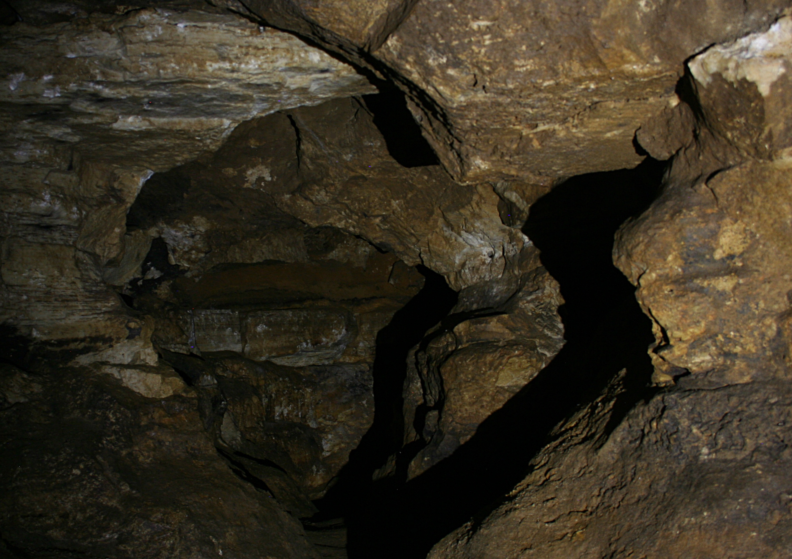 Korytarz wewnątrz Jaskini Ewy w miejscowości Draby, woj. łódzkie